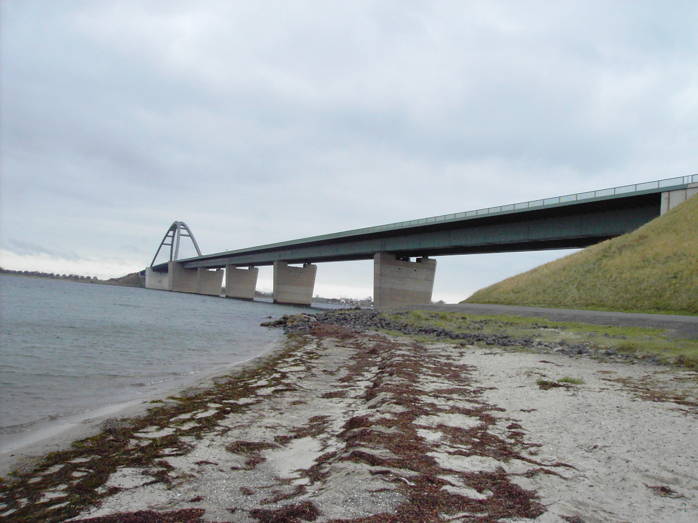 Fehmarnsundbrücke Selbst fotografiert